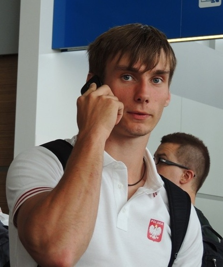 Karol Zalewski - mistrz Europy do lat 23 w biegu na 200 metrów z 2013